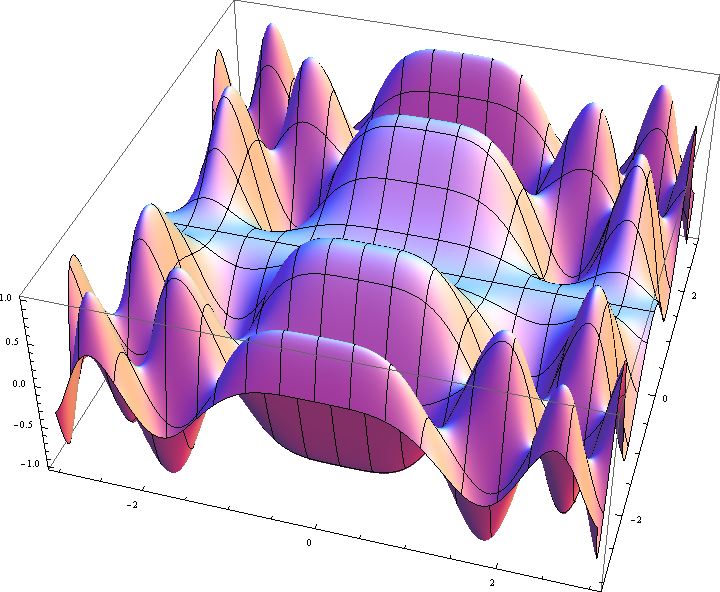 3d graph